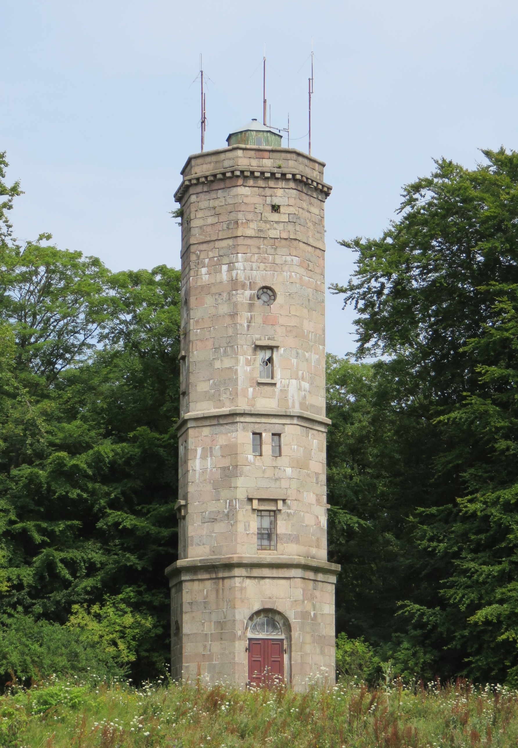 Der Elisabethturm auf dem Bungsberg, gesehen vom Parkplatz